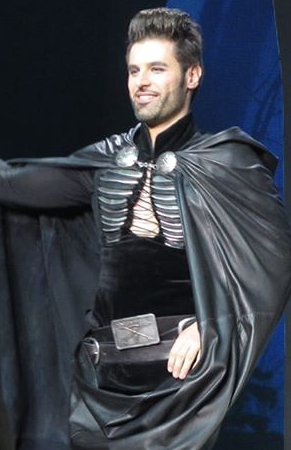 Dumè dans le rôle du Shérif de Nottingham dans la comédie musicale Robin des Bois. Photo prise le 9 février 2014 au Palais des congrès de Paris.